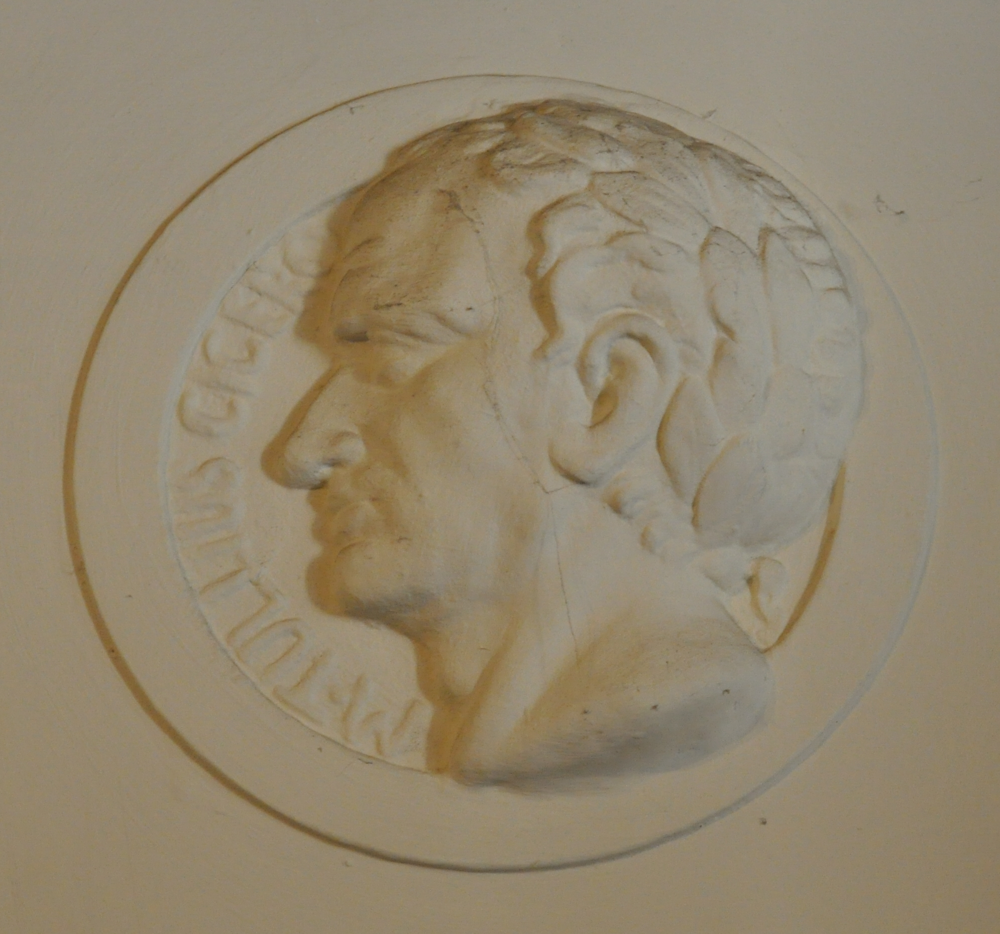 Ravensburg, „Spohn-Gebäude“ von 1914 (Sitz des Spohn-Gymnasiums und des Albert-Einstein-Gymnasiums), Eingangshalle